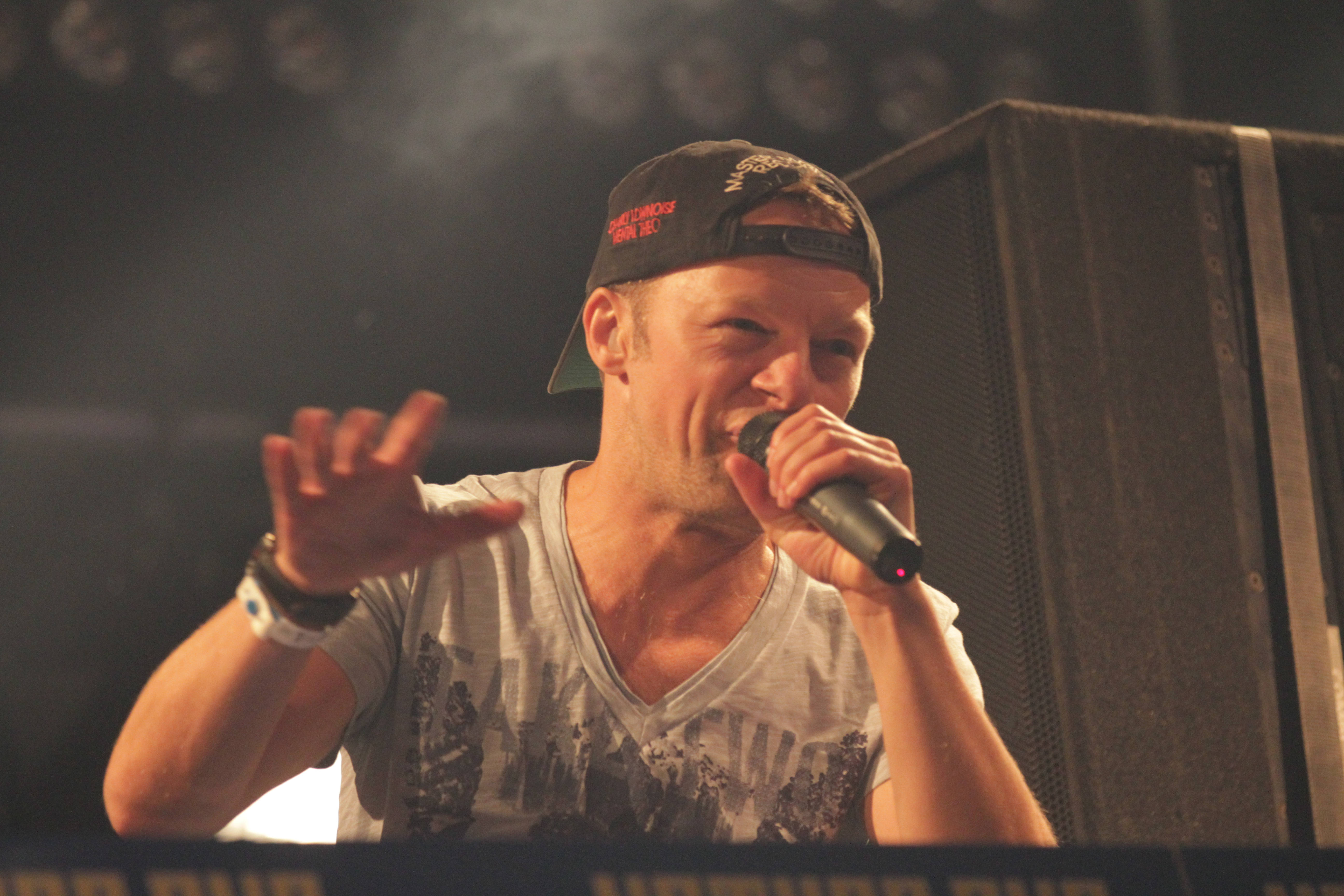 Charlie Lownoise auf der Nature One 2013